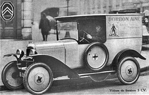 Citroen 5HP VL - Carte postale publicitaire Citroën.